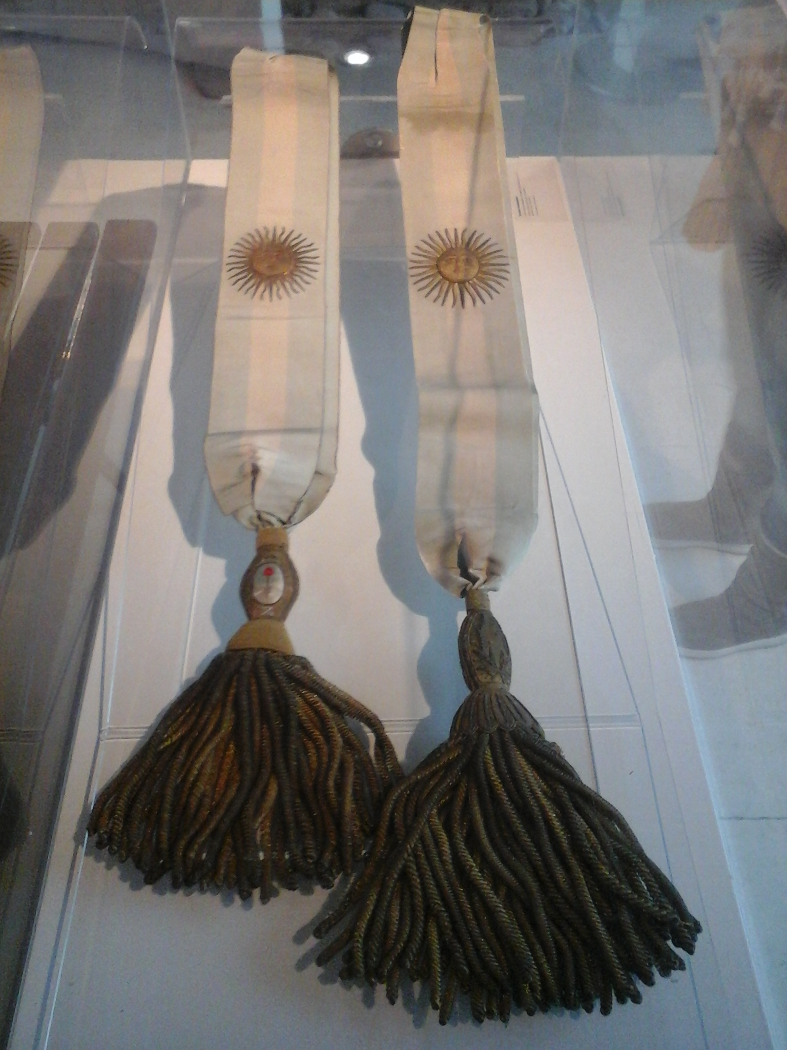 La banda de Perón cuando fue Presidente de la Republica argentina